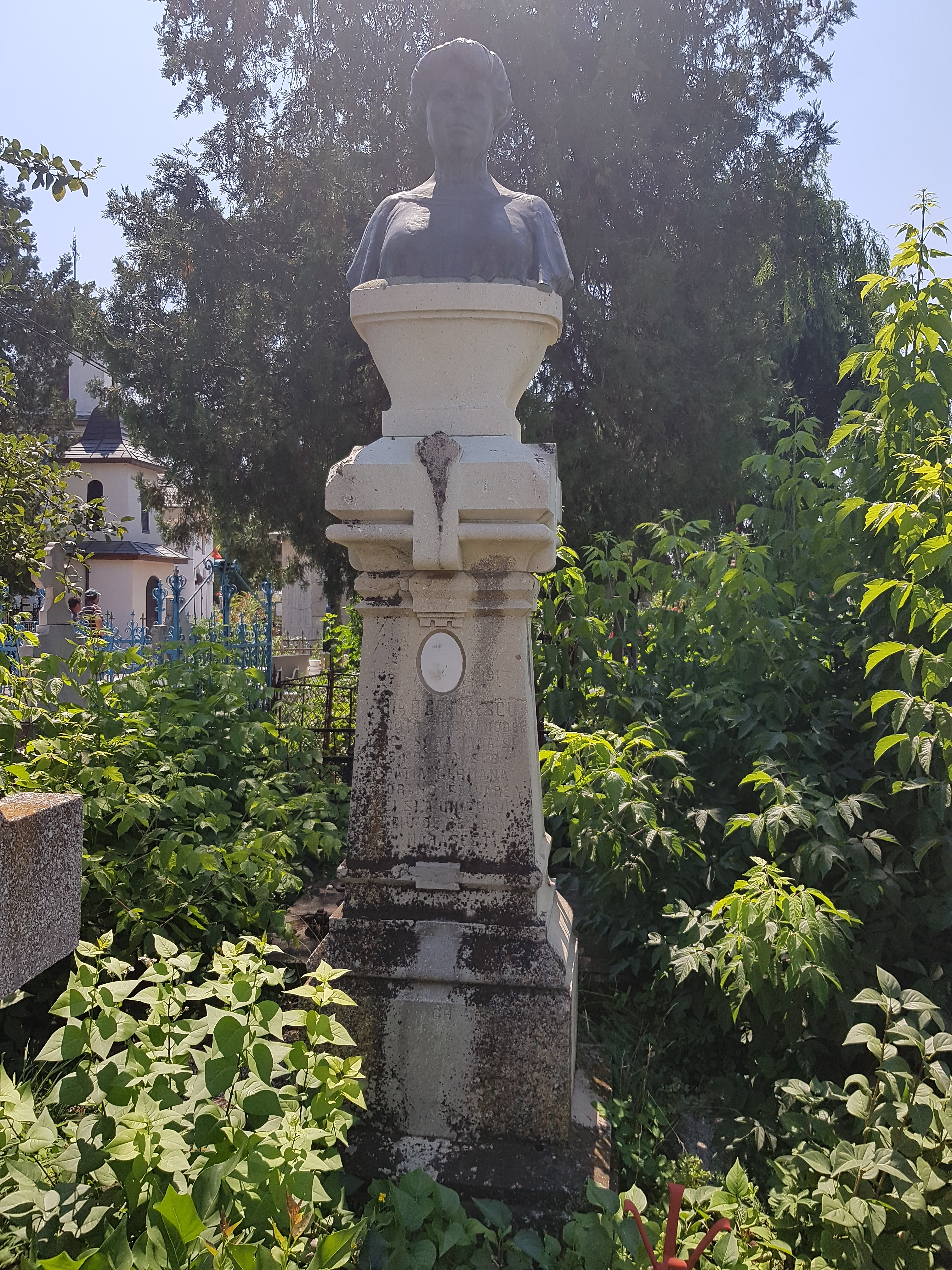 Bustul Mariei Georgescu